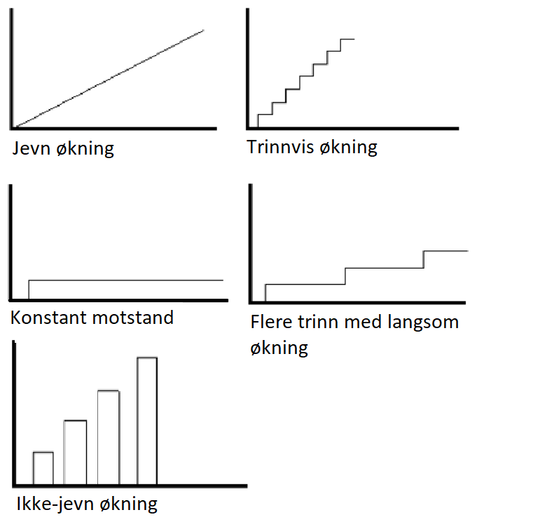 Ulike protokoller for kardiopulmonal belastningstesting på tredemølle eller sykkel